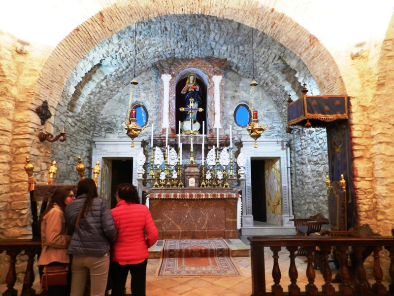 La chiesa di Santa Maria dei Greci (XI secolo) a Molinara, in provincia di Benevento